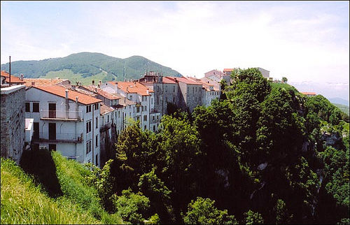 Capracotta, Italy